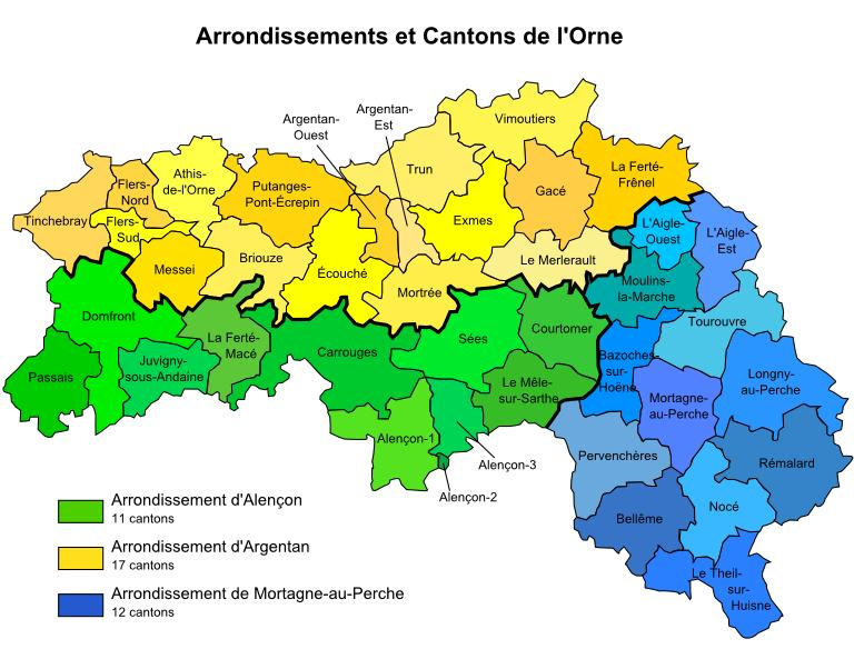 Carte des arrondissement et des cantons du département français de l'Orne